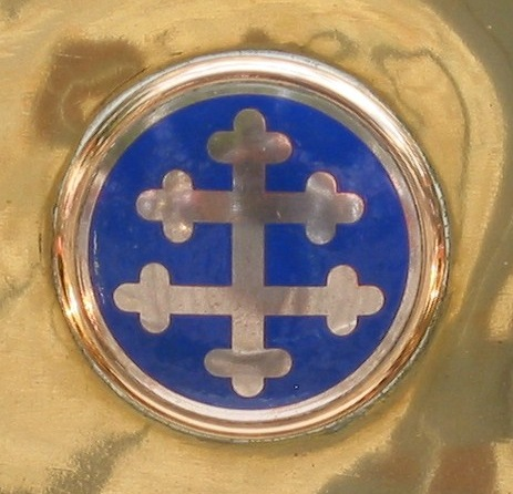 Emblem Lorraine-Dietrich 1908